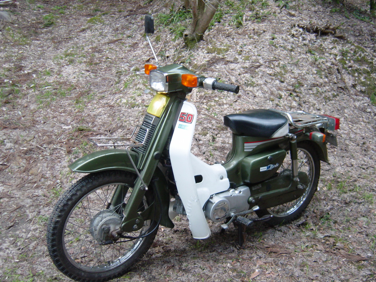 スズキバーディー(FR50)2サイクル6V車